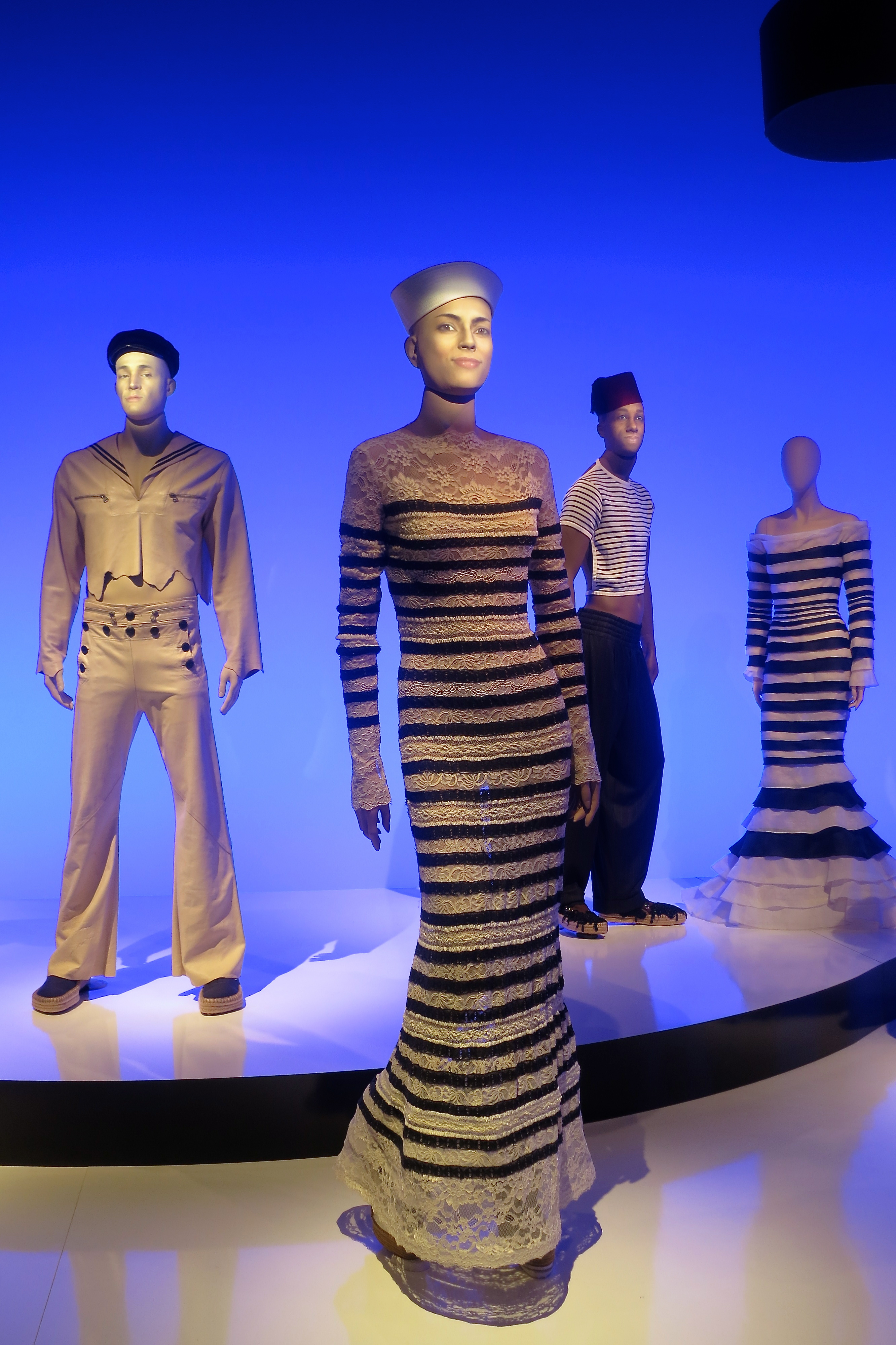 Collectie Haute Couture Salon Atmosphere. Haute Couture voorjaar/zomer 1997. Kanten jurk met zeemansstrepen. Bron: Kunsthal